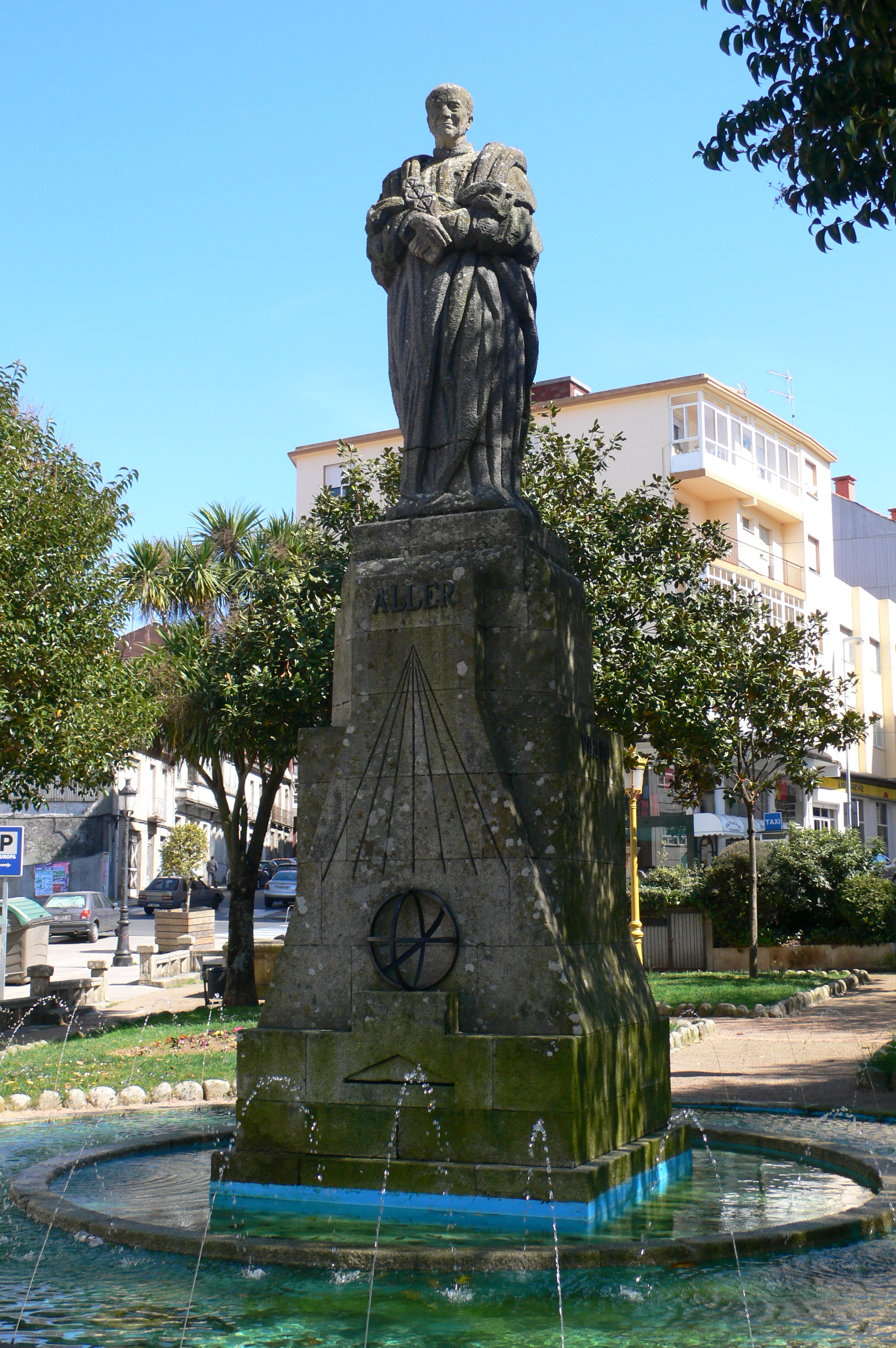 Monumento a Ramón Mª Aller Ulloa en Lalín